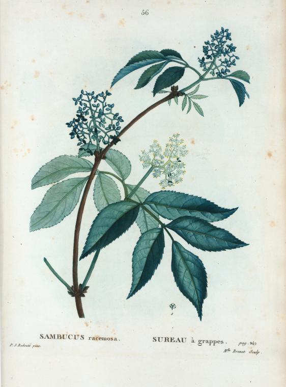 Sambucus racemosa = Sureau à grappes.